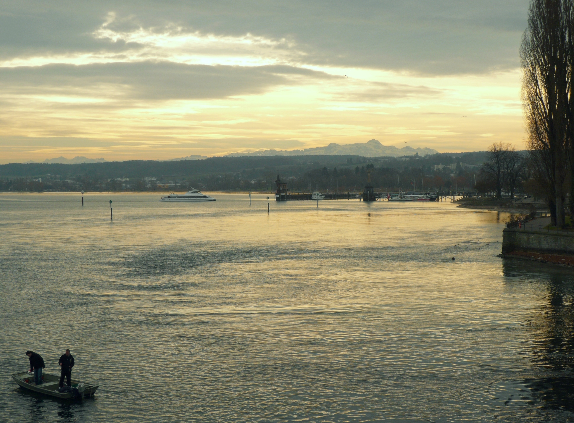 Bodensee near Konstanz in winter